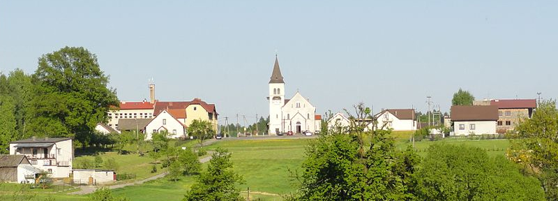 Panorama wsi Hażlach